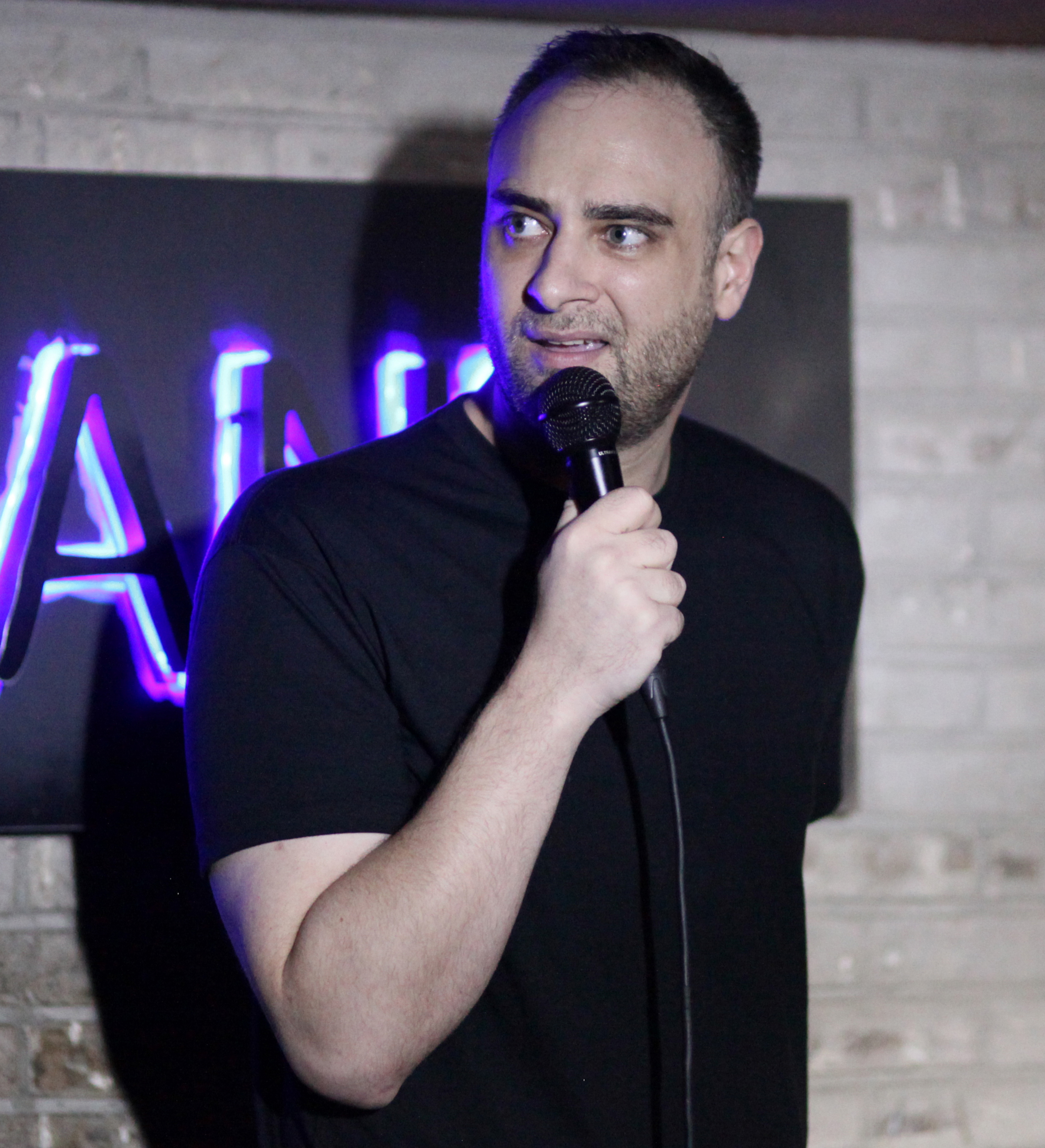 Metzger in November 2016.